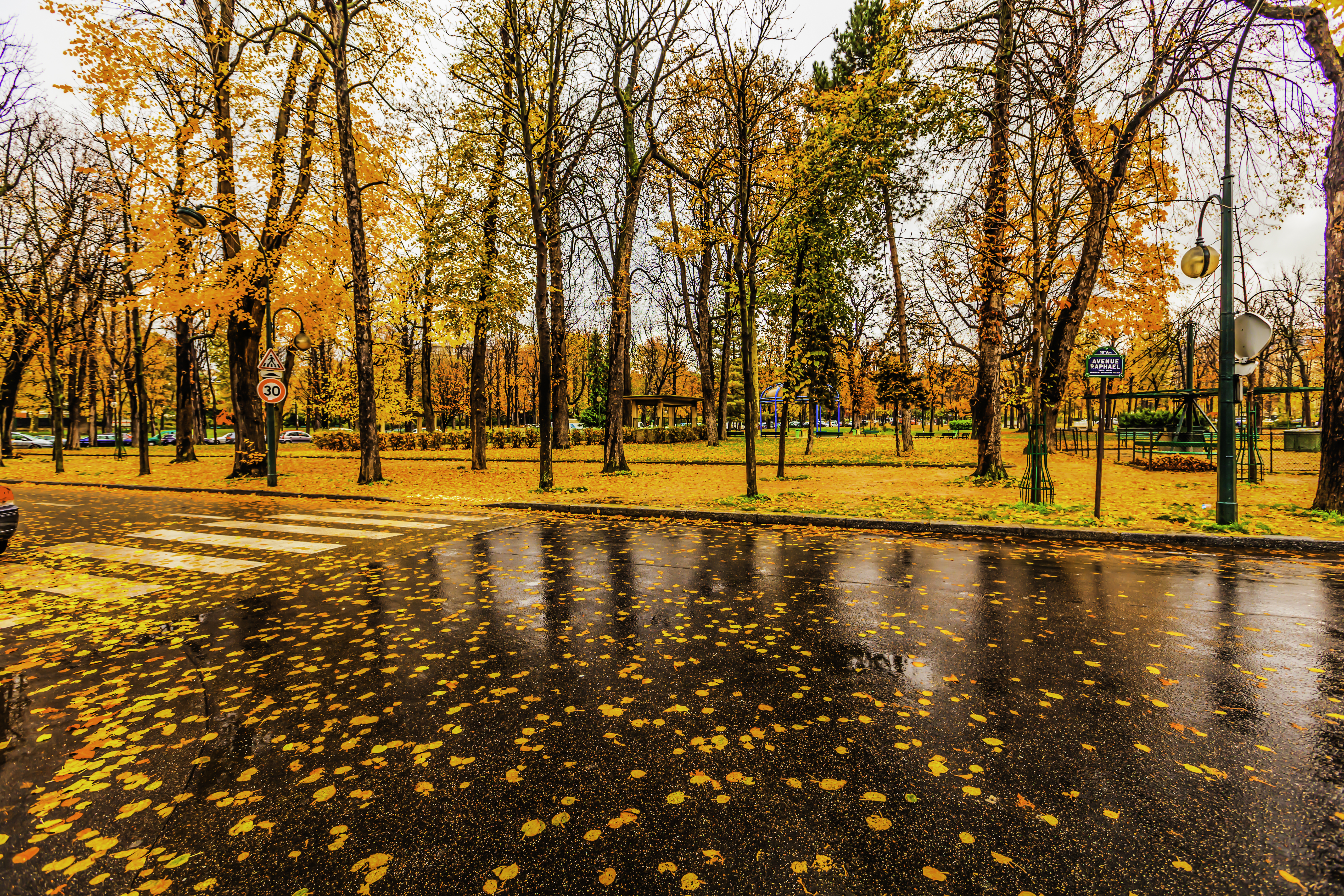 Couleurs automnales, avenue Raphaël à Paris.